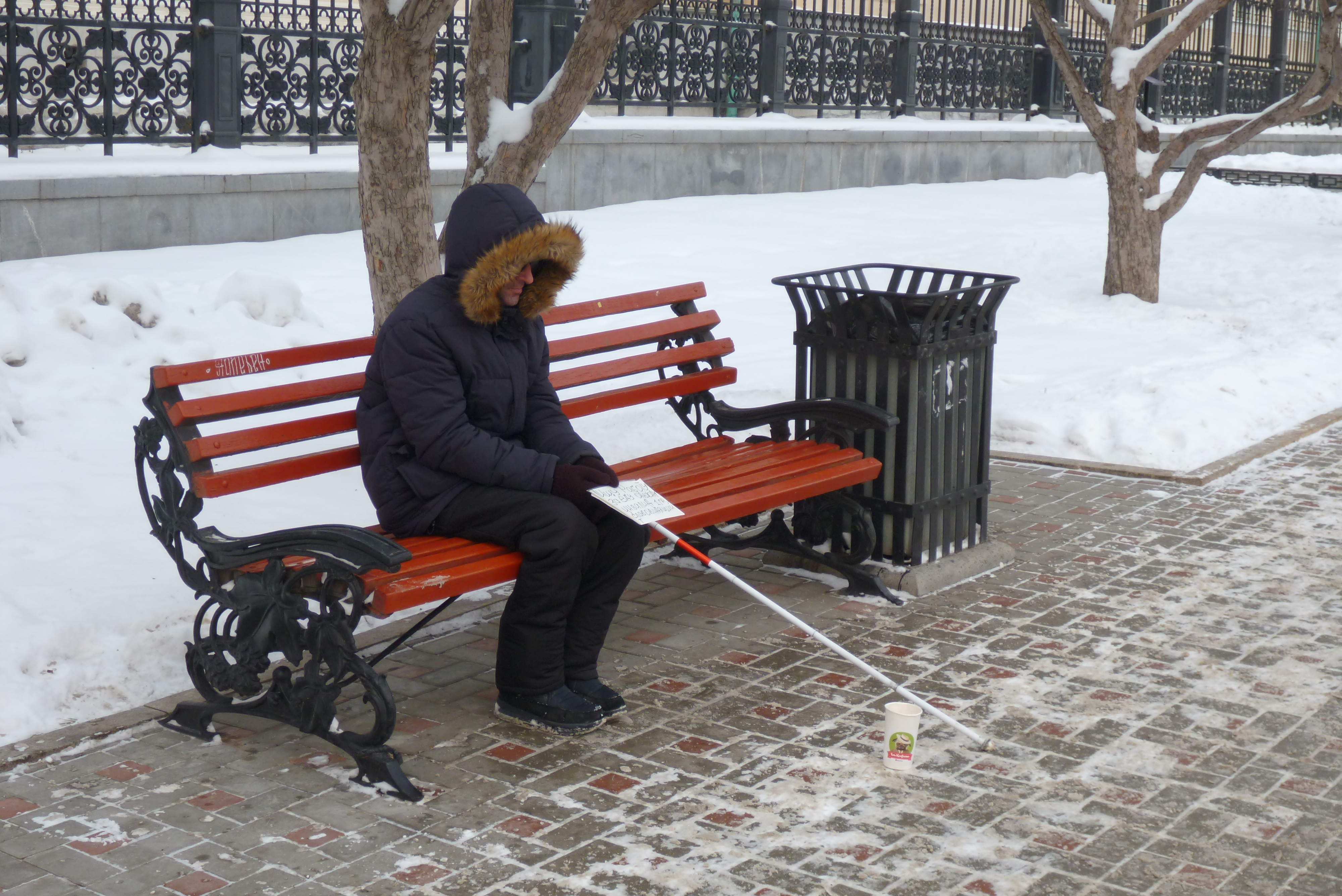 Слепой инвалид ищет работу в центре Екатеринбурга 2 декабря 2018 года